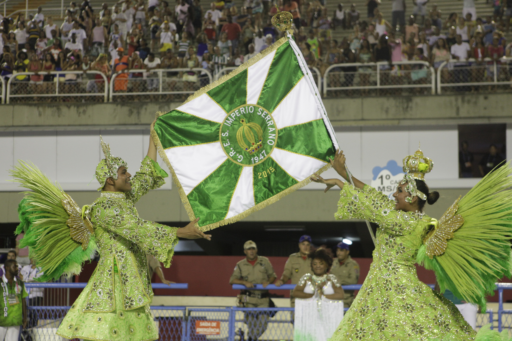 Desfile de carnaval na Sapucaí no Carnaval de 2015. (Gabriel Santos/Agência Brasil)